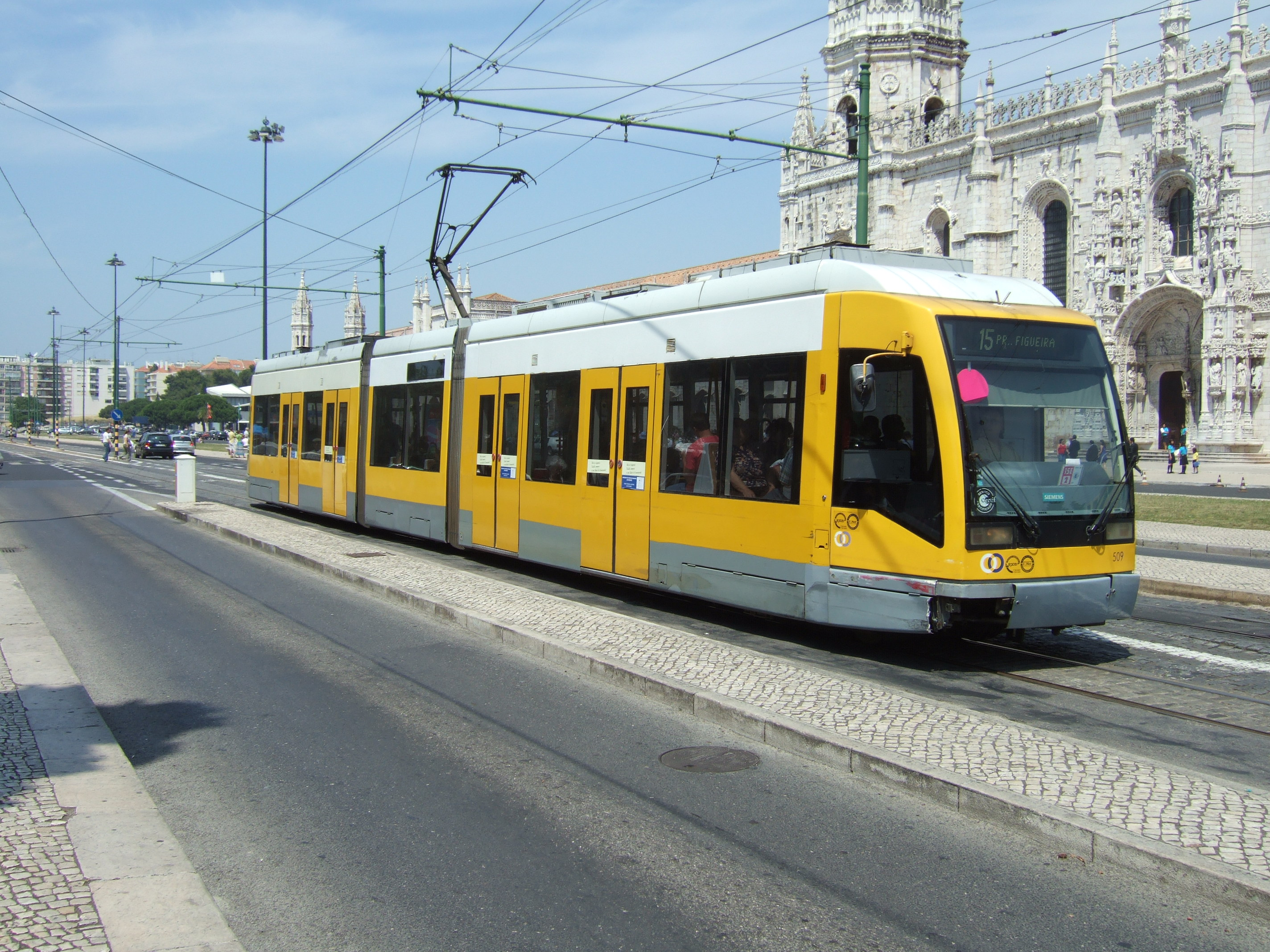 Photo: Trams aux Fils. Ligne 15, direction Pl. FIGUEIRA Rua de Bélem Tram 509 de la série 501-510